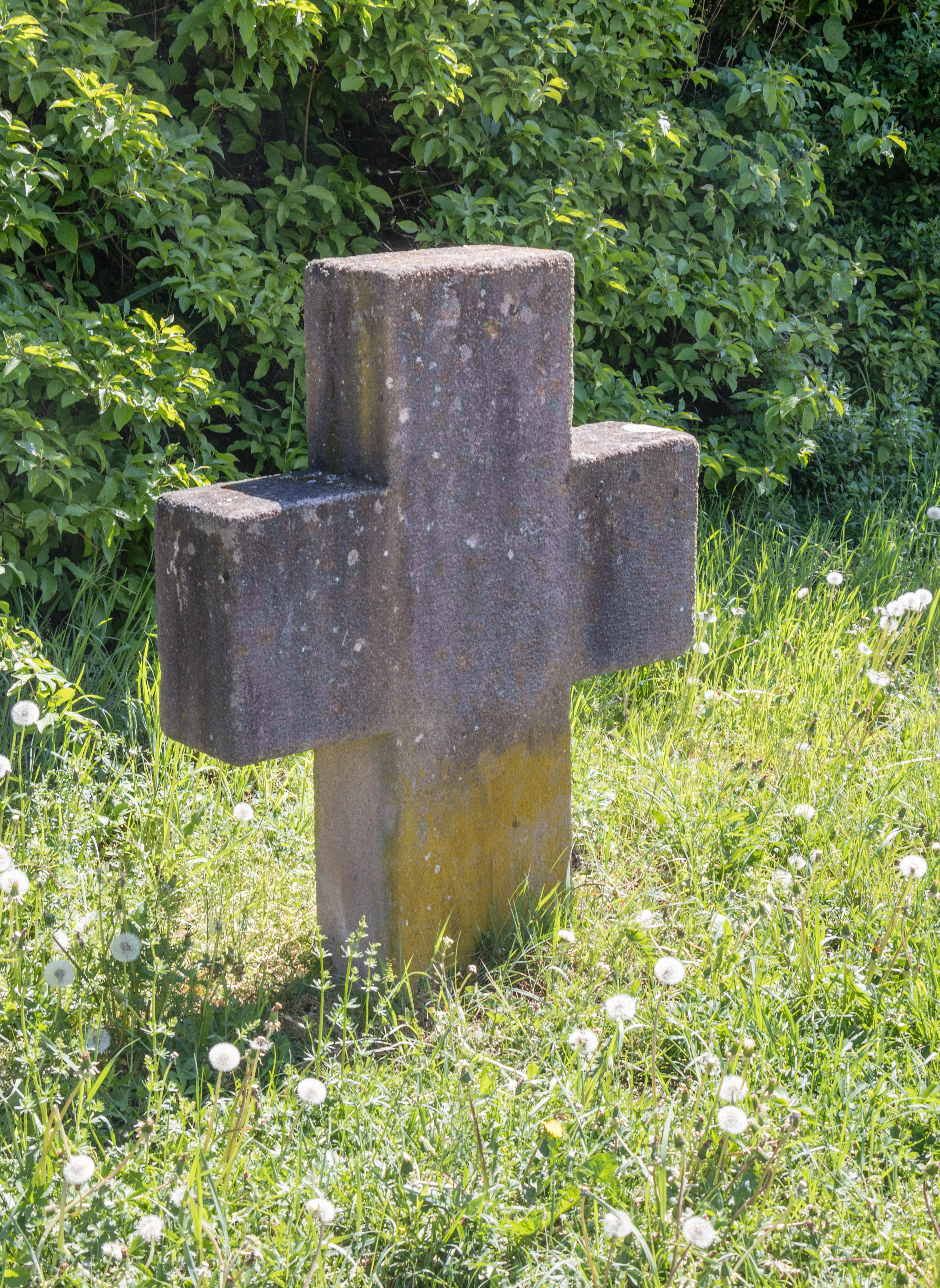 Steinkreuz, Rednitzhembach, Perspektive